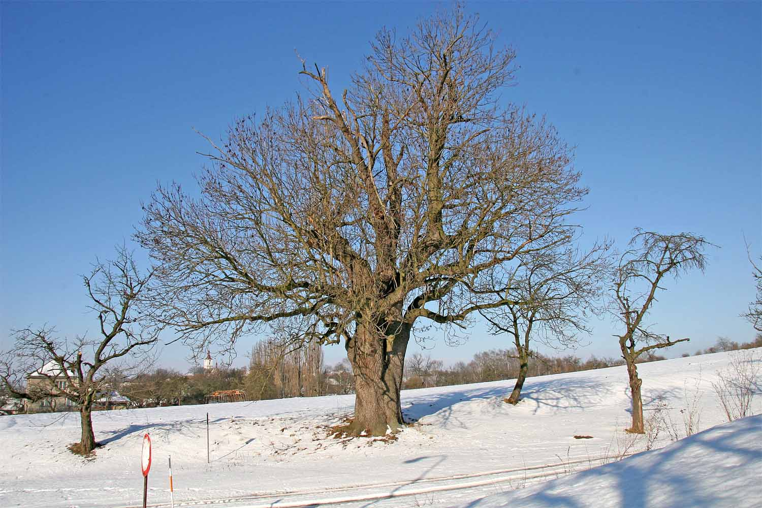 památný jasan ztepilý ve Starém Bydžově autor:Zp